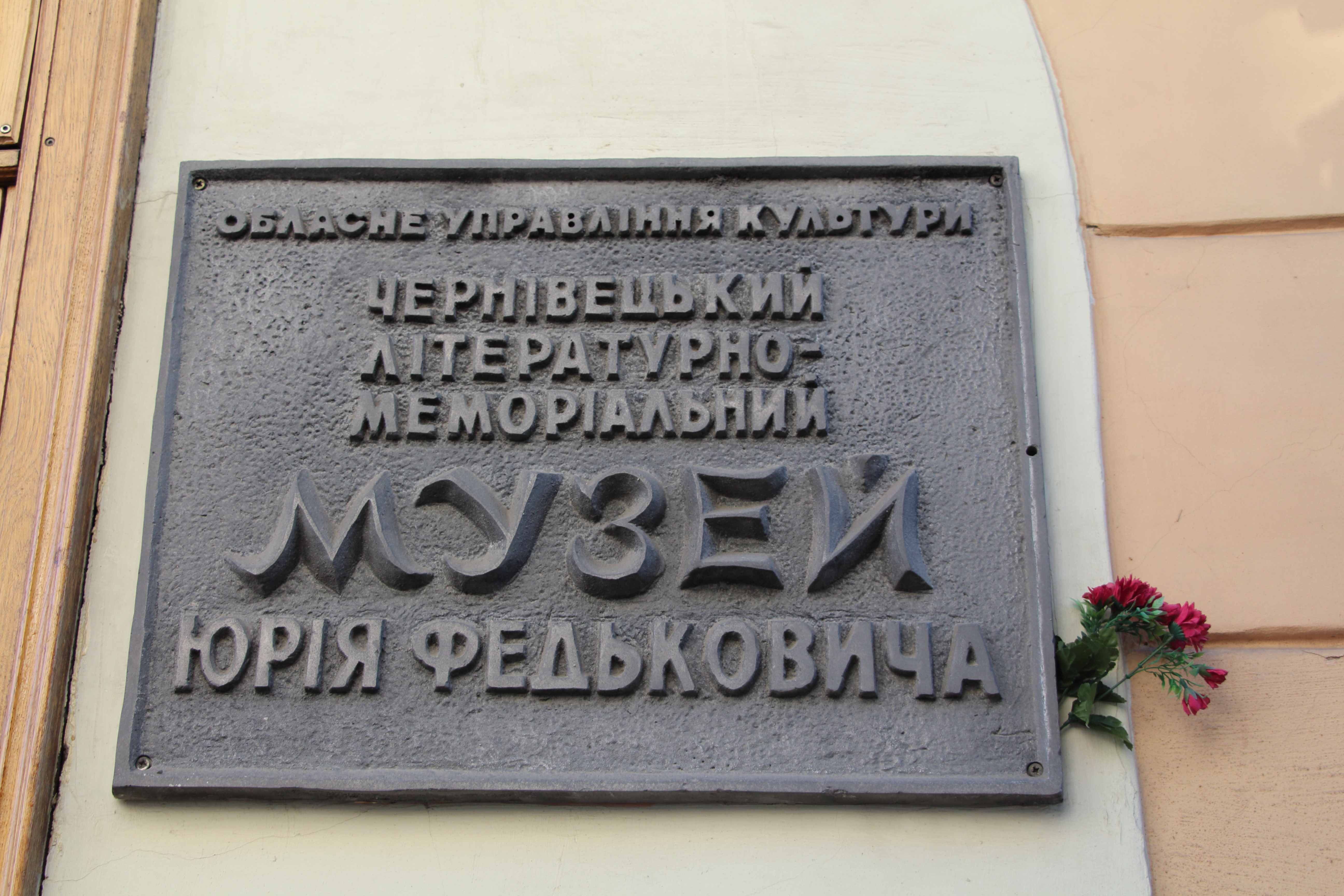 Музей Юрия Федьковича в г. Черновцы